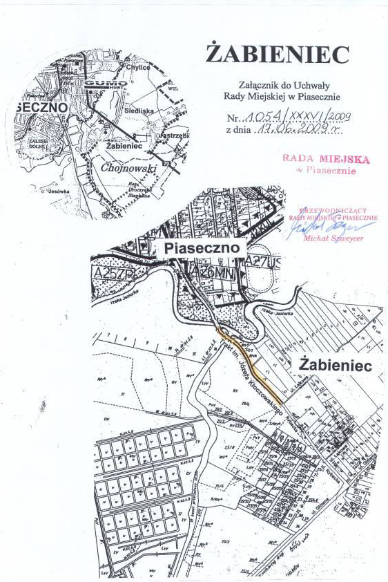 Załącznik do Uchwały nr 1054/XXXVI/2009 Rady Miejskiej w Piasecznie z dnia 17.06.2009 r.w sprawie nadania nazwy „Trakt im. Józefa Kłoczowskiego” drodze położonej we wsi Żabieniec w gminie Piaseczno